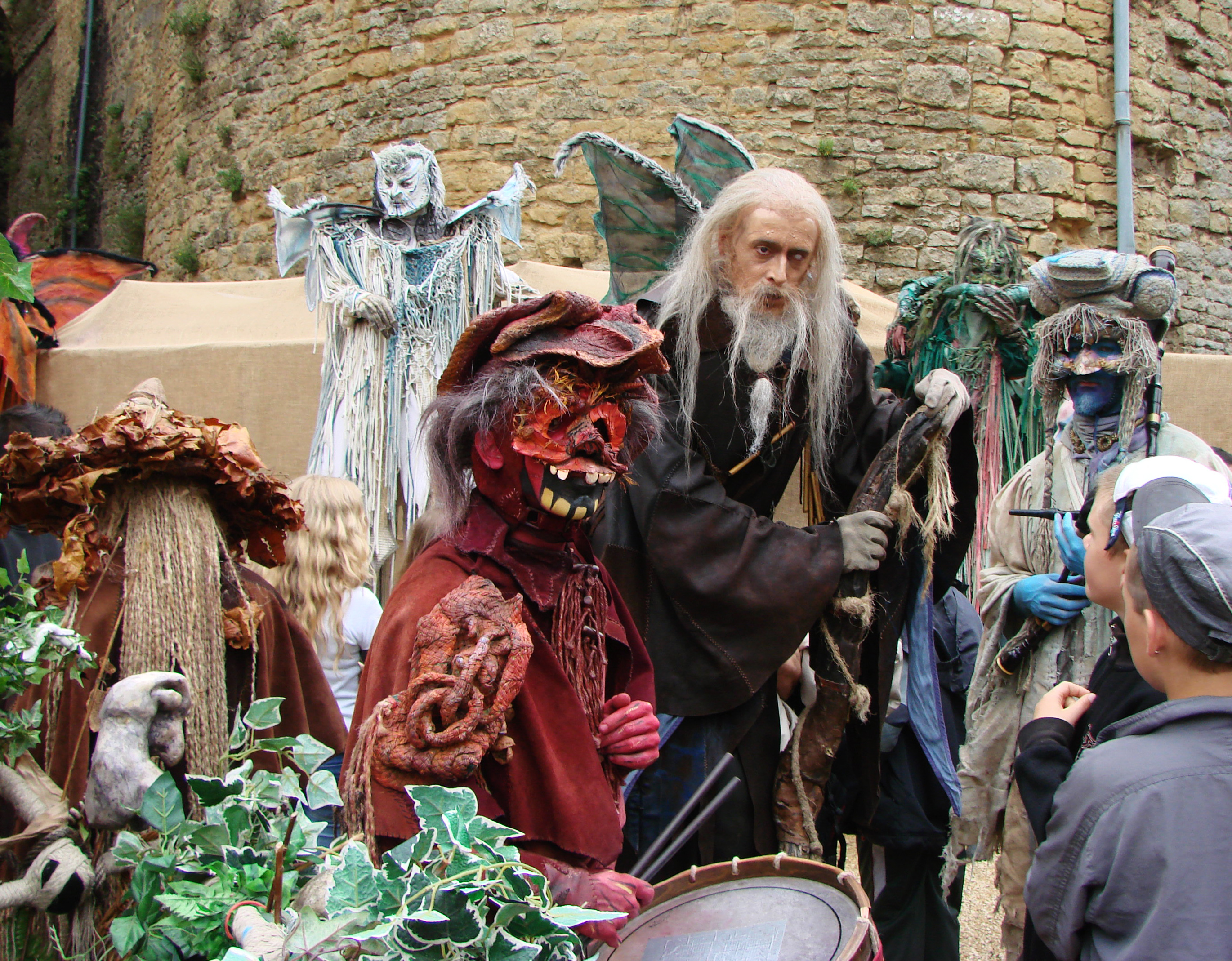 Artistes de la compagnie Entr'act Ouroboros, au festival médiéval de Sedan (08 France), le 20 Mai 2007.